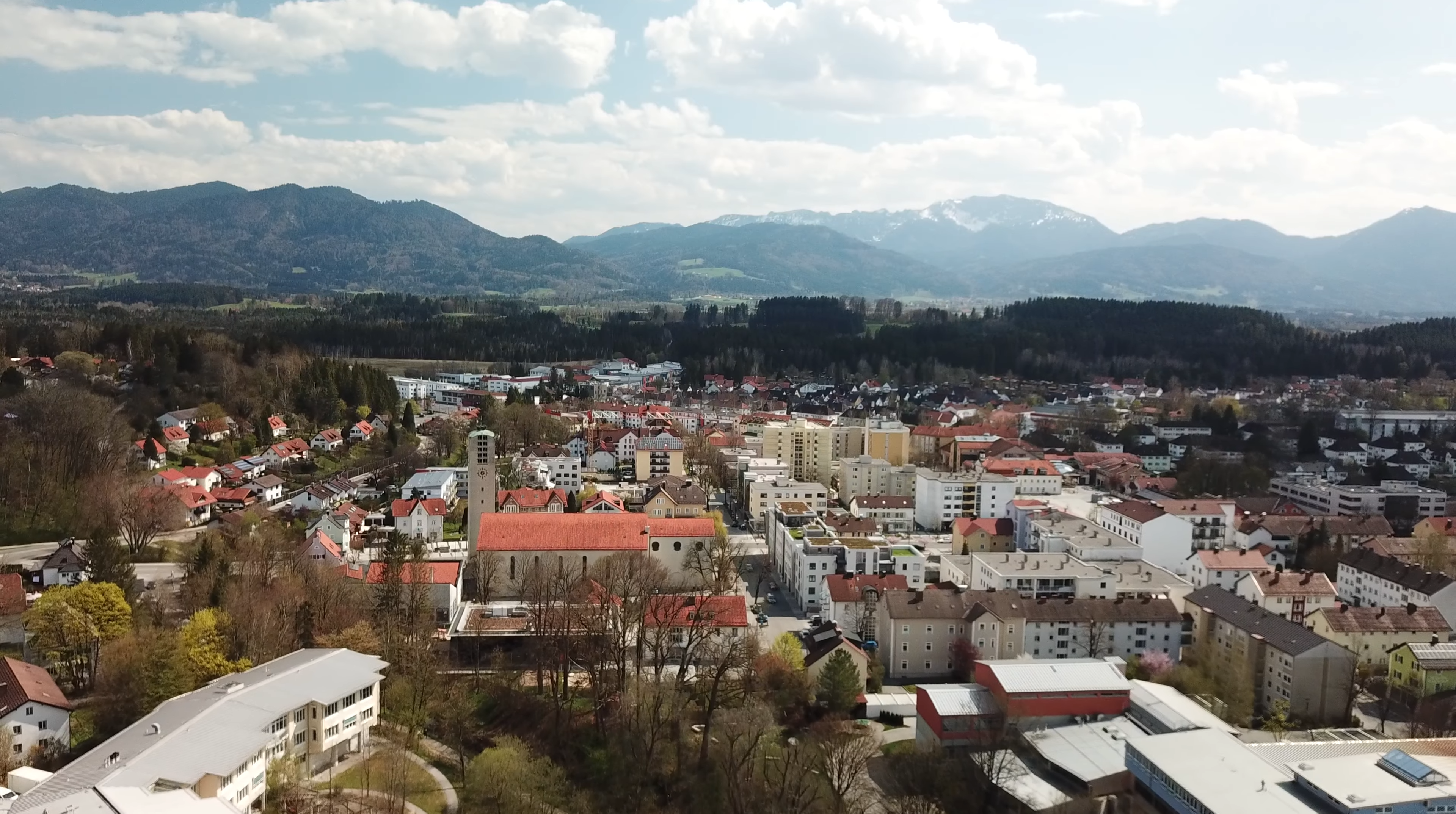 Luftaufnahme der Stadt Penzberg im Oberbayerischen Landkreis Weilheim-Schongau. Zentrum mit Rathaus, Stadtplatz rechts und das Klinikum und die katholische Kirche links